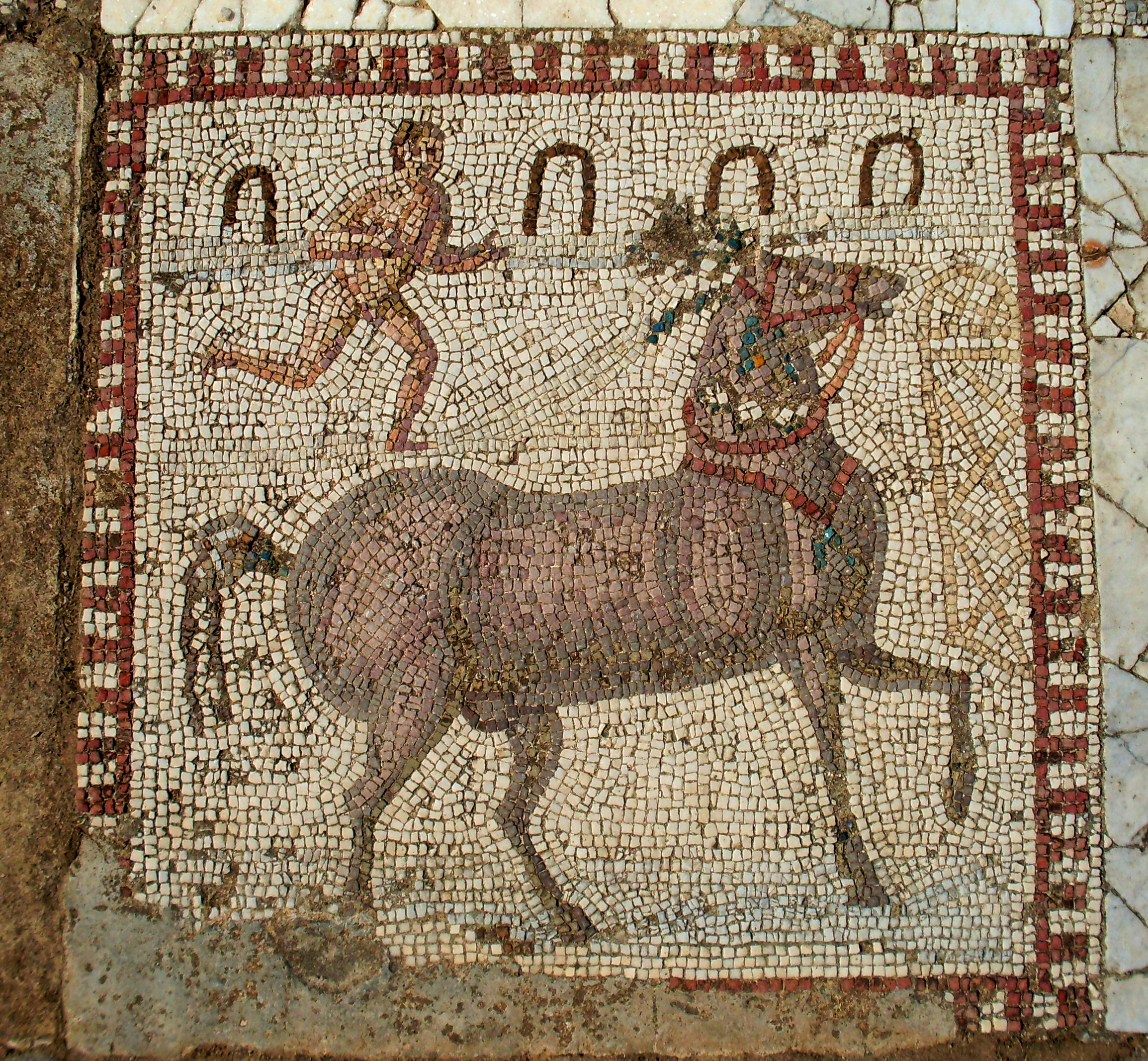 Tunis, Mosaïque à la villa de la volière à Carthage